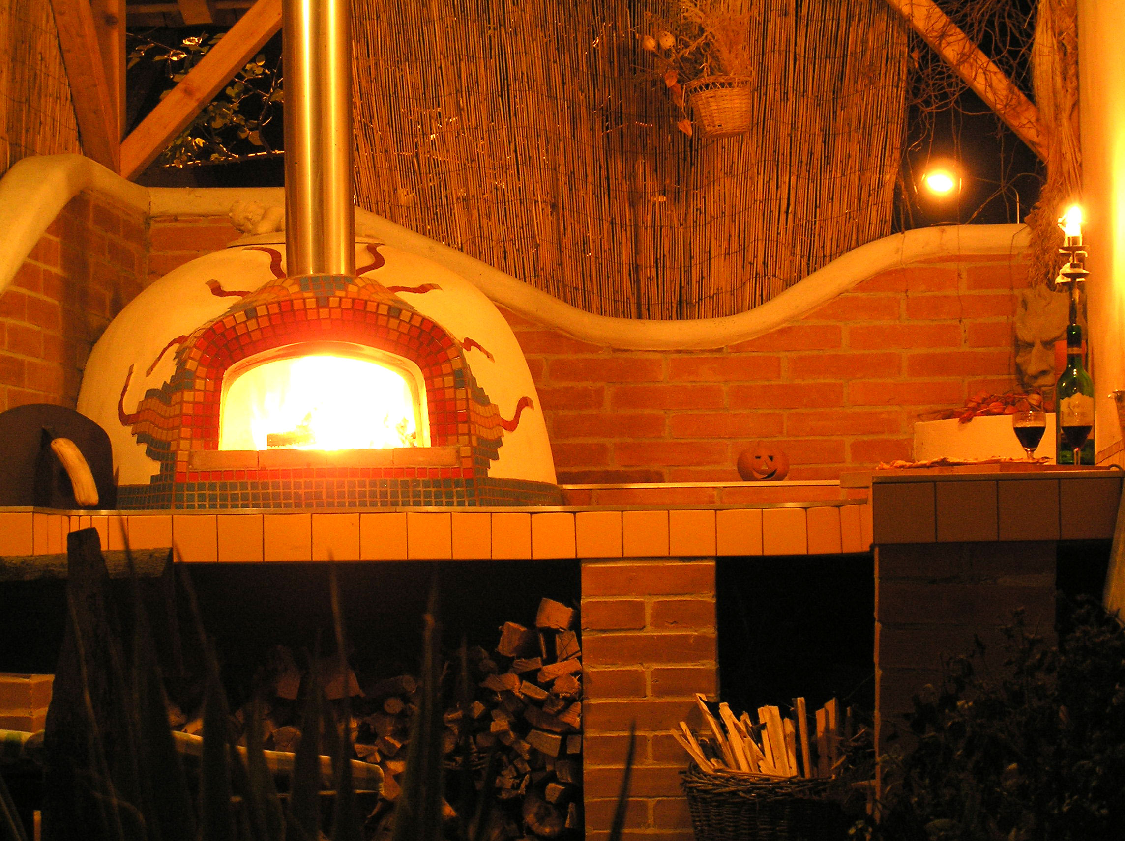 I v noci je pec působivá.